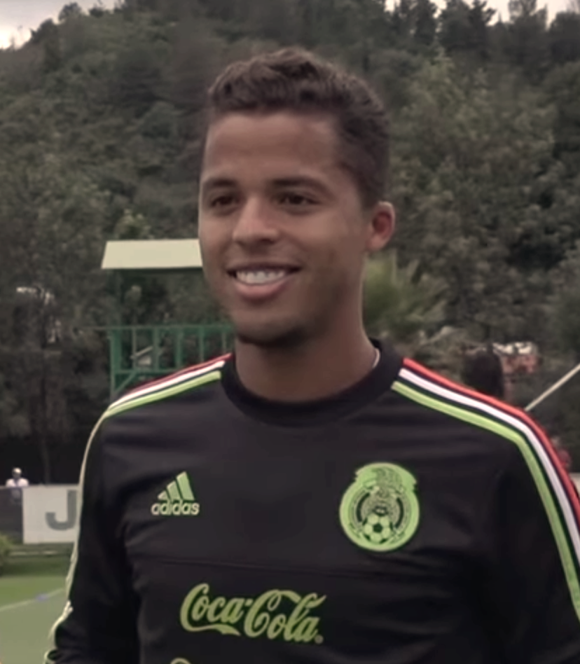 Giovani dos Santos en 2017.